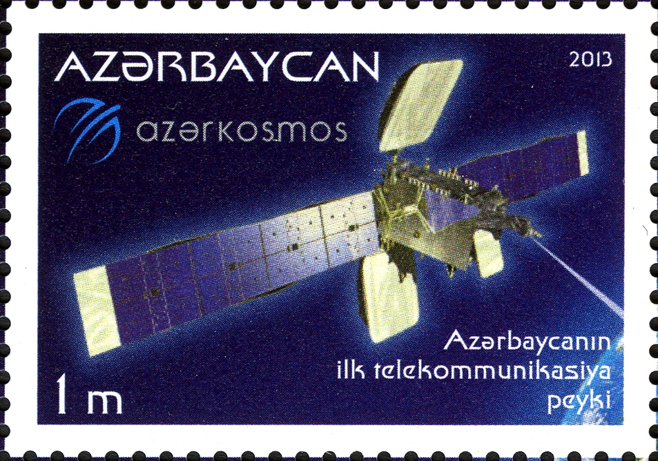 N 1070 - 1 manat. The stamp is devoted to the launch of first telecommunication satellite of Azerbaijan to the orbit.